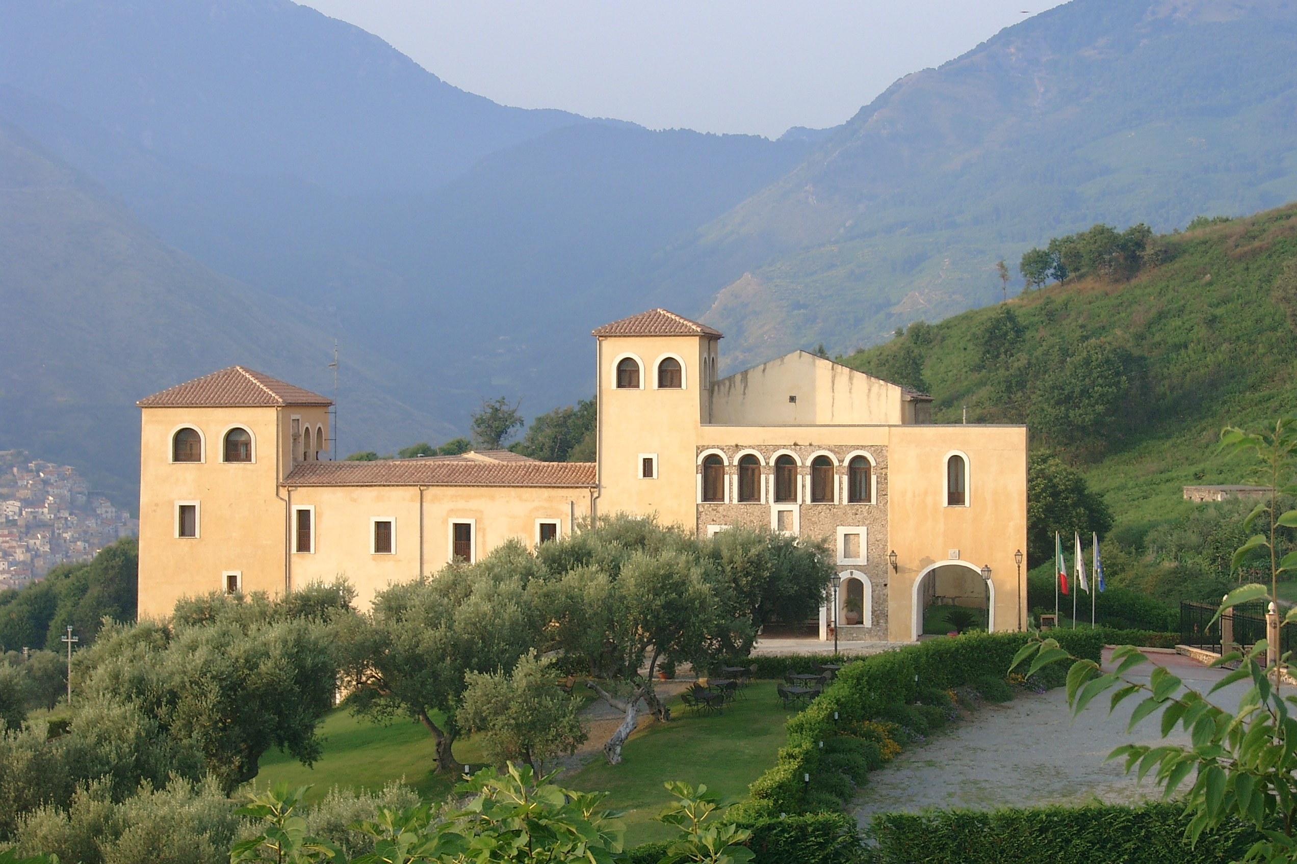 L'ex convento dei Frati Minimi di san Francesco di Paola. Bonifati, CS, Calabria. Foto personale, luglio 2006. . Foto scattata da Cristiano Cameroni nel mese di luglio 2006.